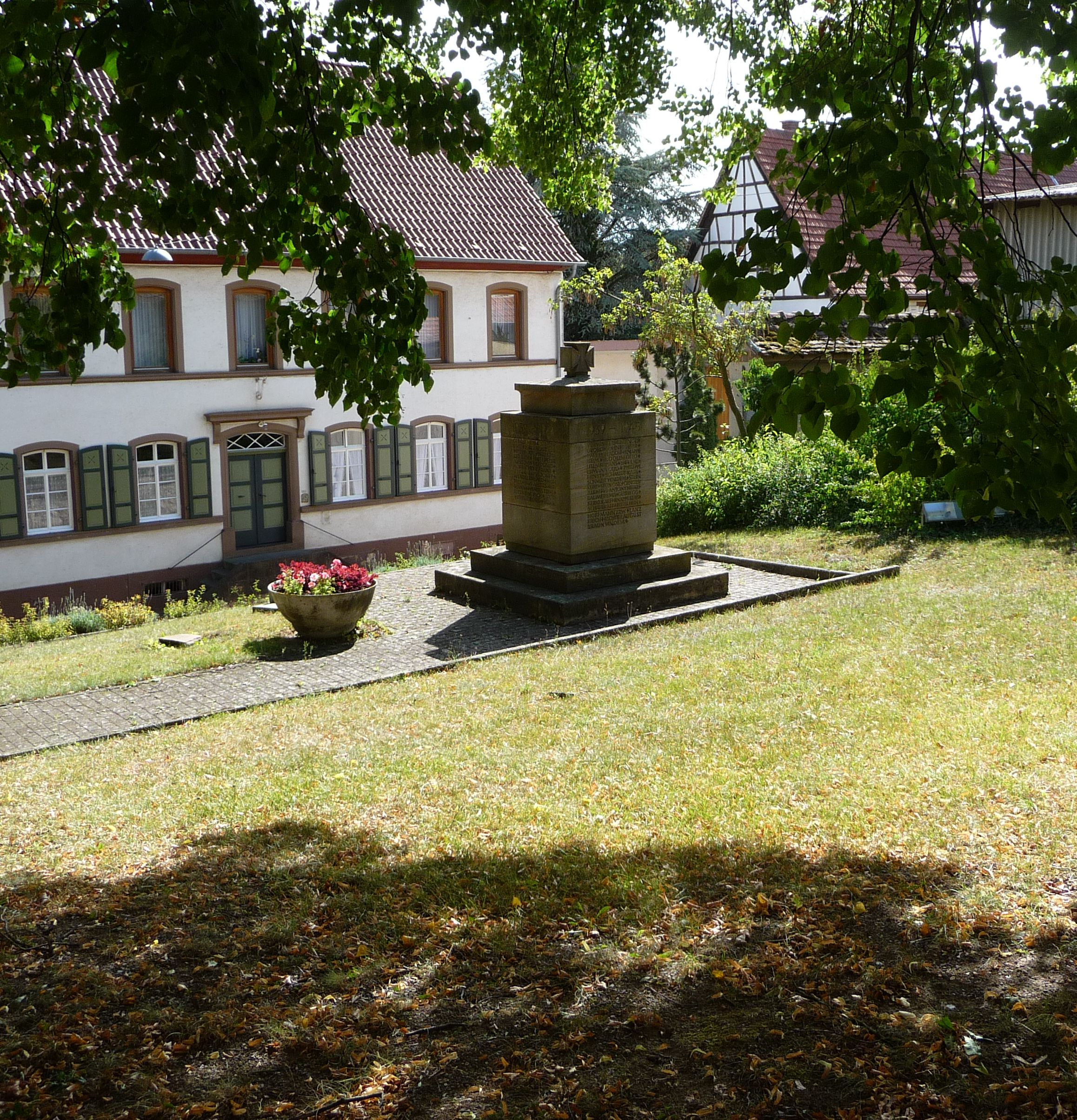 Kriegerdenkmal